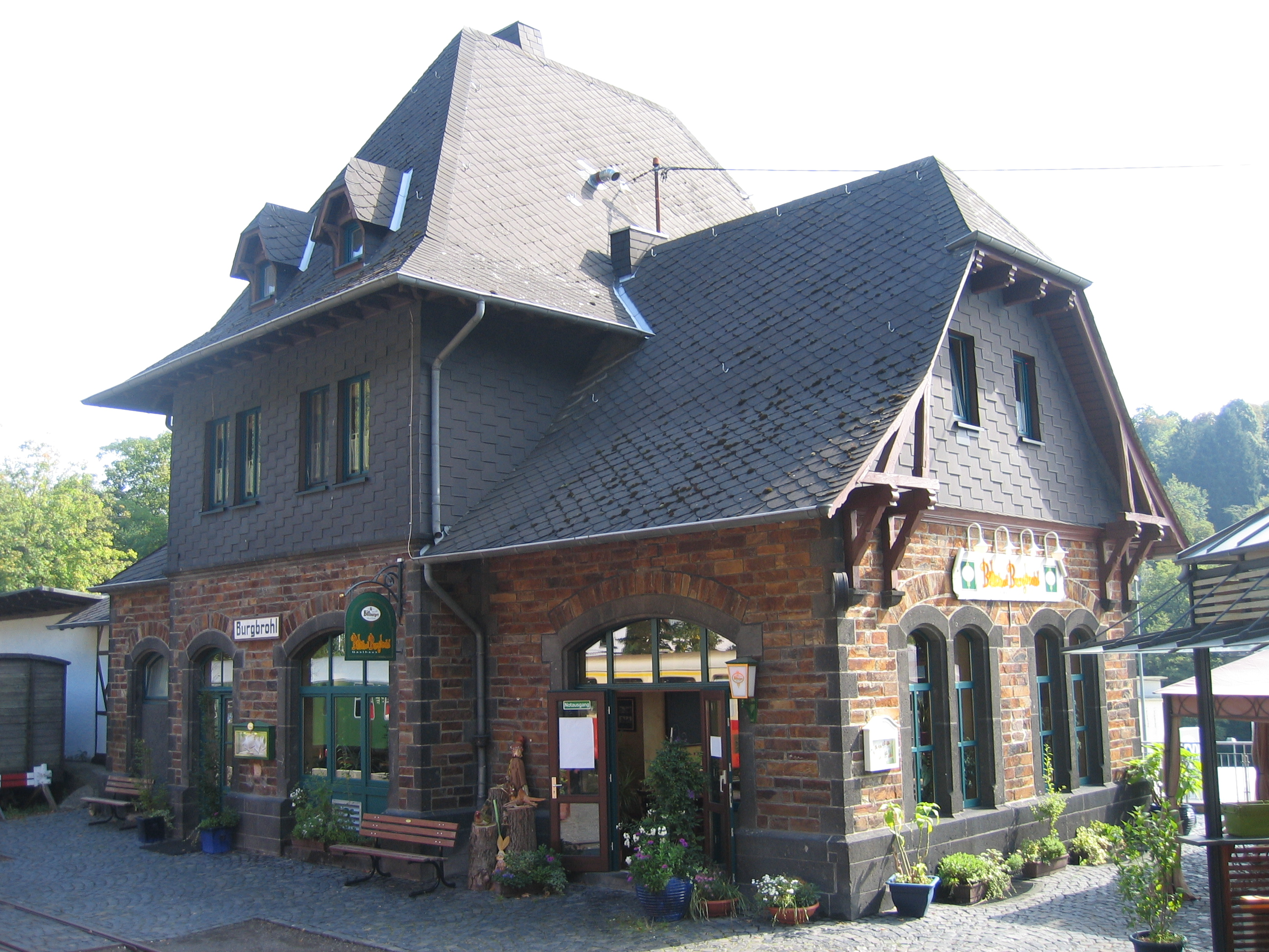 Der Bahnhof Burgbrohl der Brohltalbahn